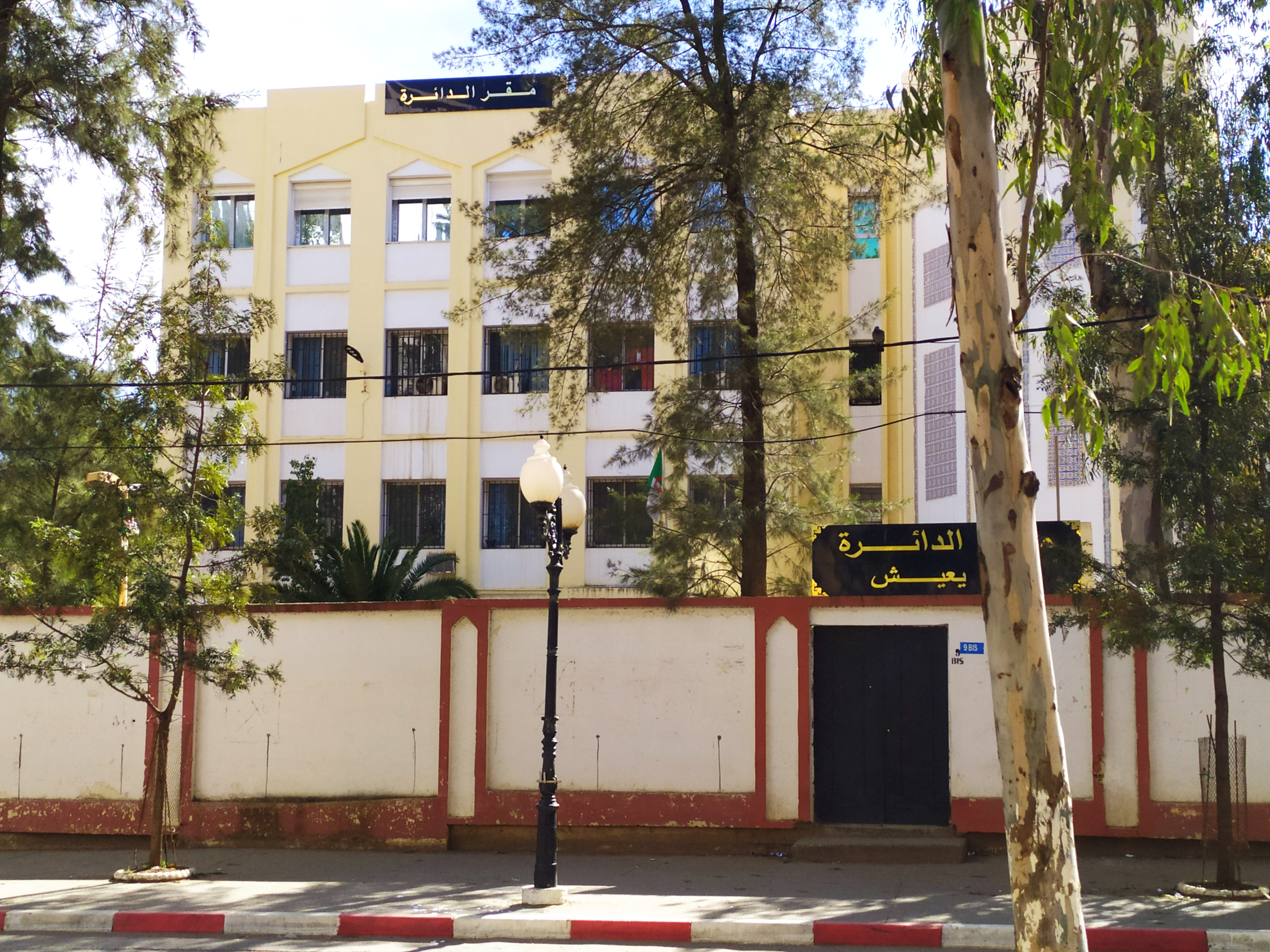 Siège de Daira Ouled Yaich à Wilaya de Blida.